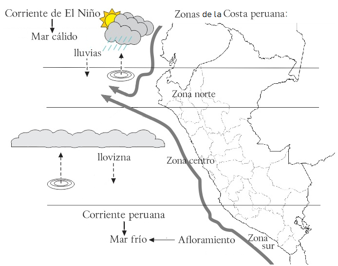 Corrientes marinas del Perú. Eventual confluencia de la corriente fría peruana con la corriente cálida de El Niño durante el verano austral.